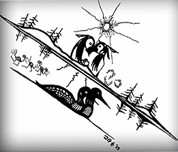 Lake Romance by Jaawano Giijik